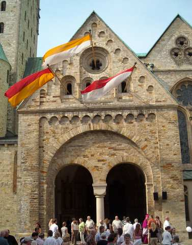 Eingangshalle des Domes in Paderborn